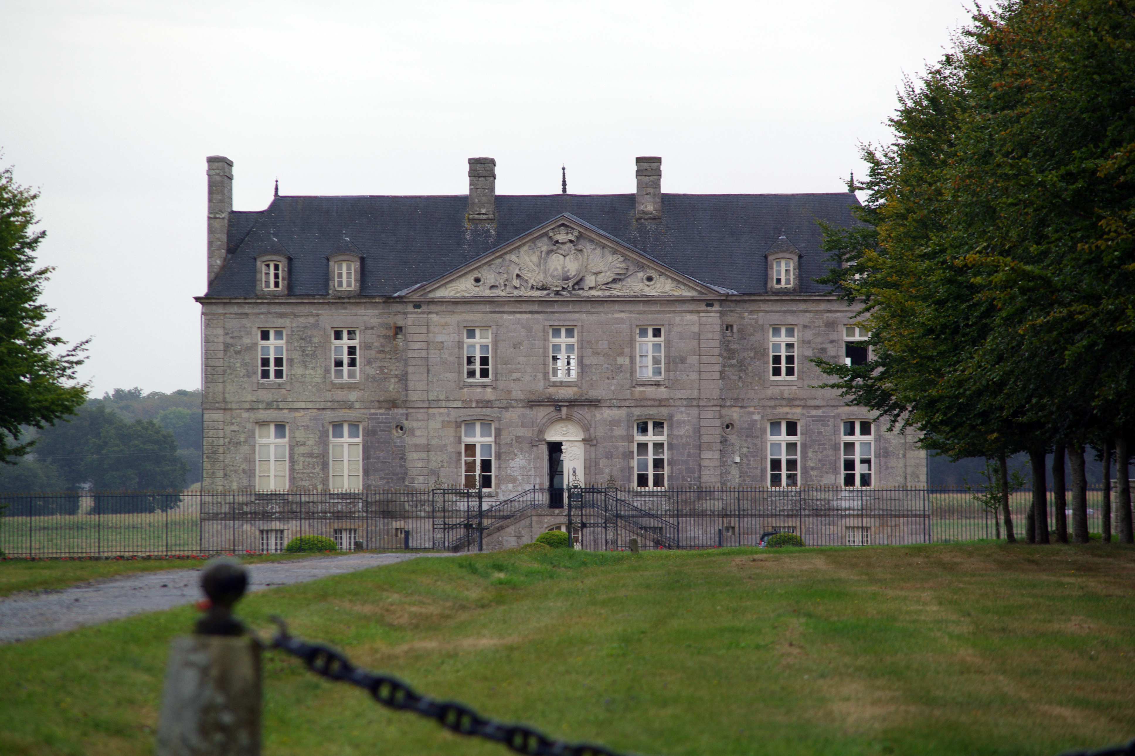 Château du Chalonge et dépendances, (Inscription, 1990) .